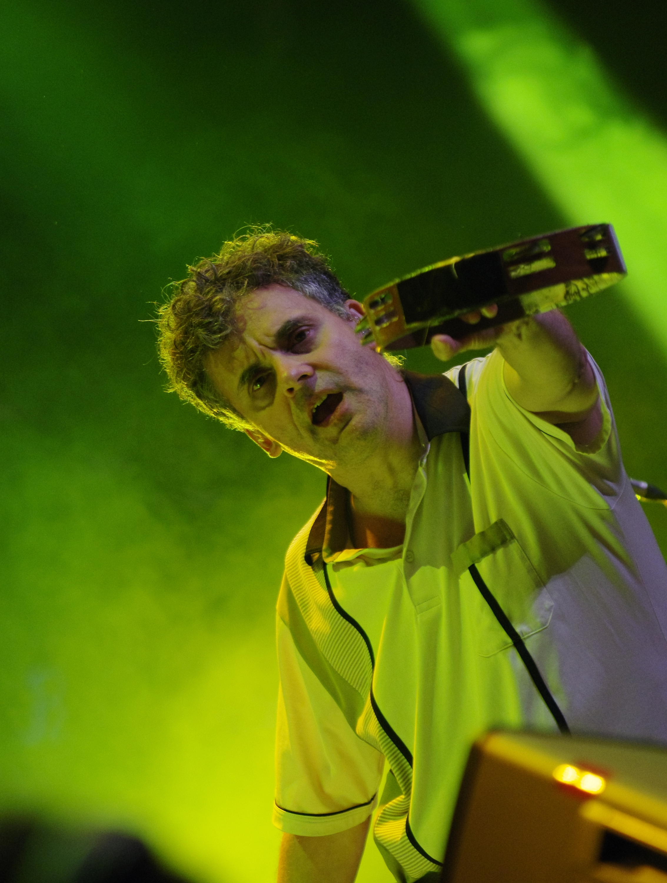 James (band) auf dem Haldern Pop Festival 2013. Hauptbühne. Besetzung: Tim Booth (Gesang) Jim Glennie (Bass) Larry Gott (Gitarre) Saul Davies (Gitarre, Violine, Percussion) Mark Hunter (Keyboards) Dave Baynton-Power (Schlagzeug) Andy Diagram (Trompete, Percussion)